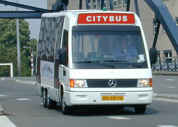 Arriva bus C2 van het type Mercedes Benz MB 100/BUSisness te Groningen.